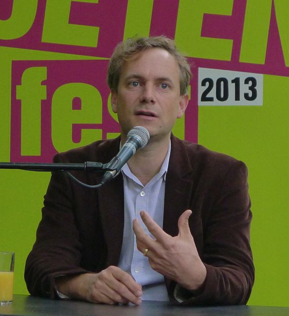 Der Schriftsteller Jo Lendle auf dem Erlanger Poetenfest 2013 bei der Vorstellung seines Romanes "Was wir Liebe nennen".